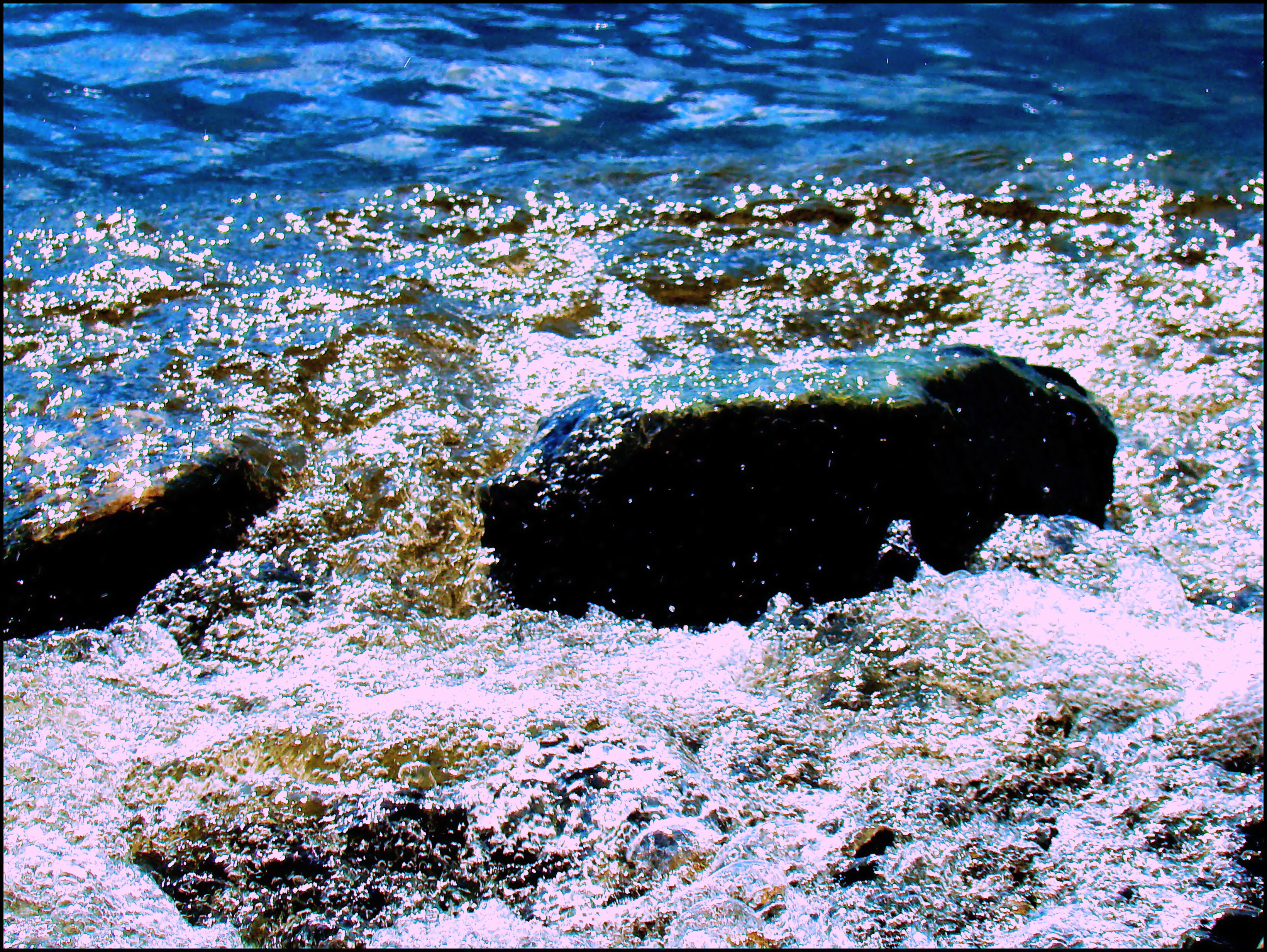 Процесс волновой обработки мелкого валуна в береговой зоне озера. Фото А. Н. Рудого. Август 2010. Алтай.